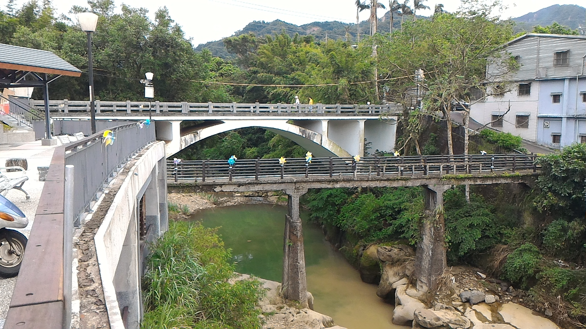 中文（台灣）: 在臺灣新北市平溪區的嶺腳古橋和平陽橋。